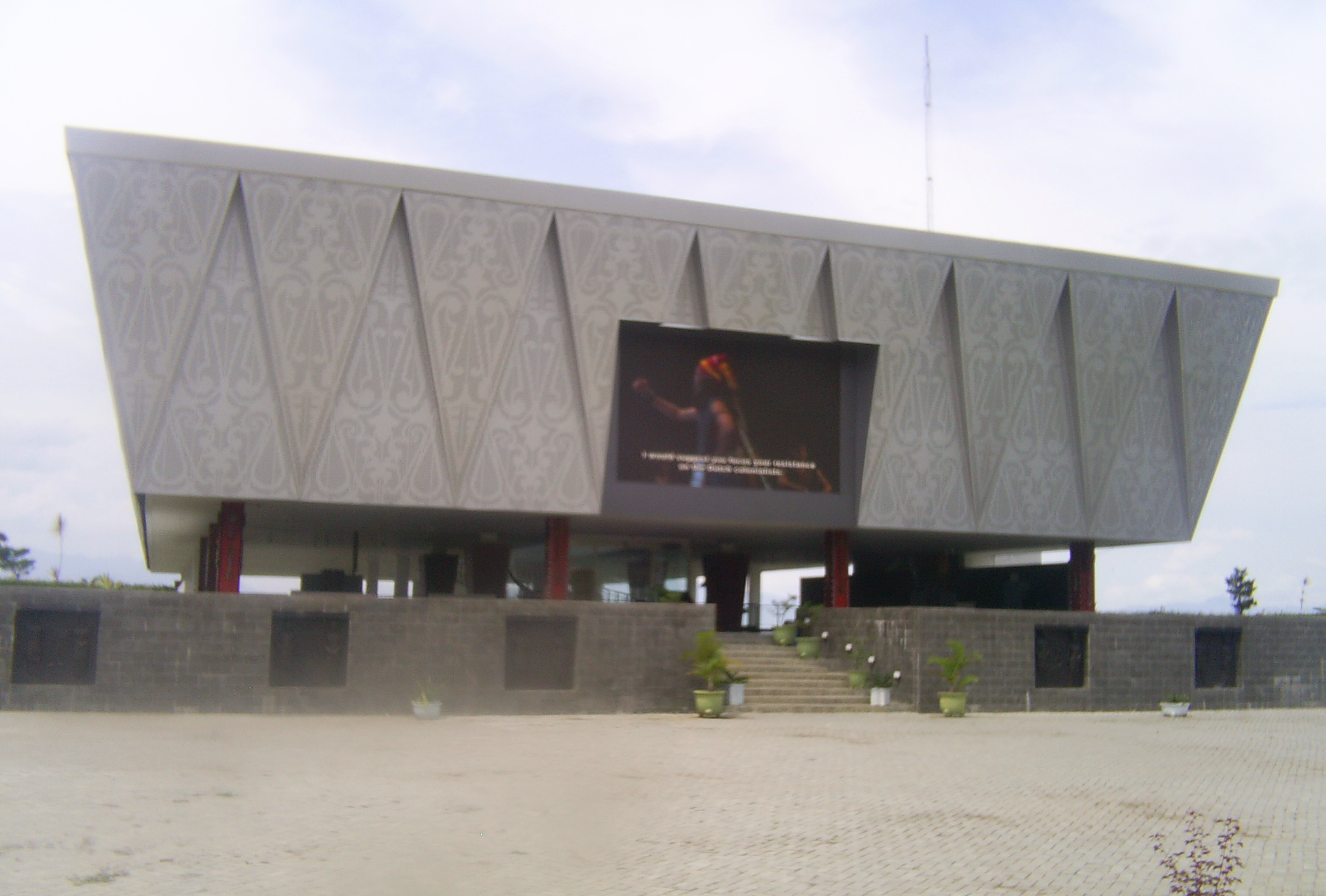 Museum Batak, Balige